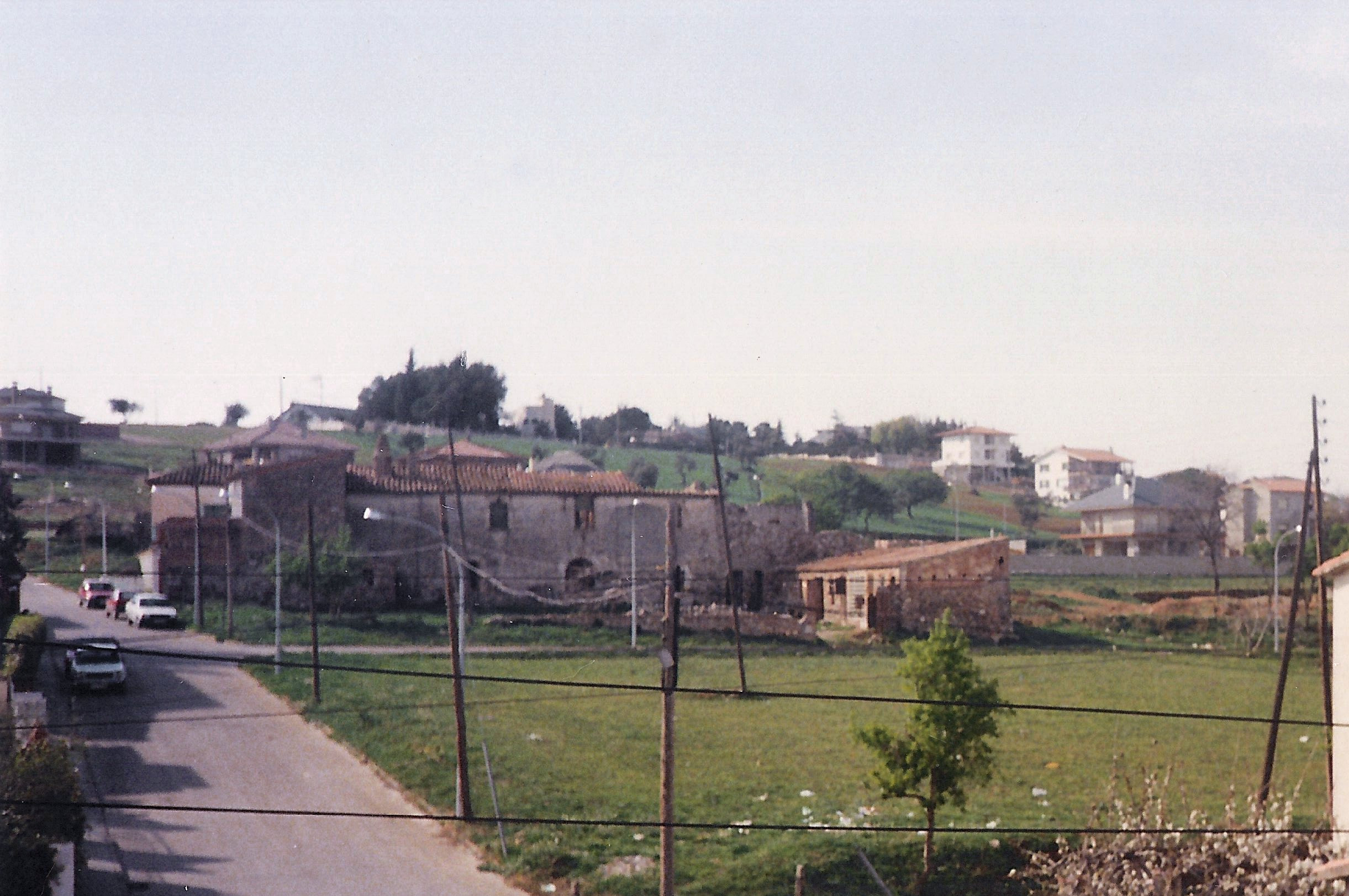 Antiga masia (ja enderrocada) de Can Camps, a Canovelles. Fotografia presa als voltants de l'abril de 1989.